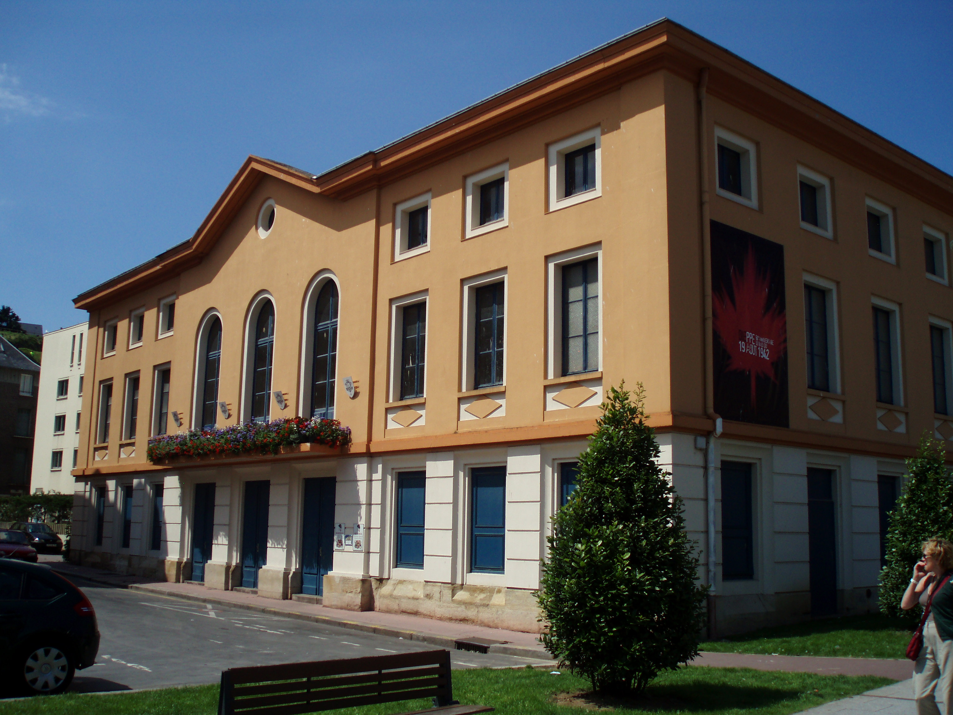 Petit théatre municipal de Dieppe